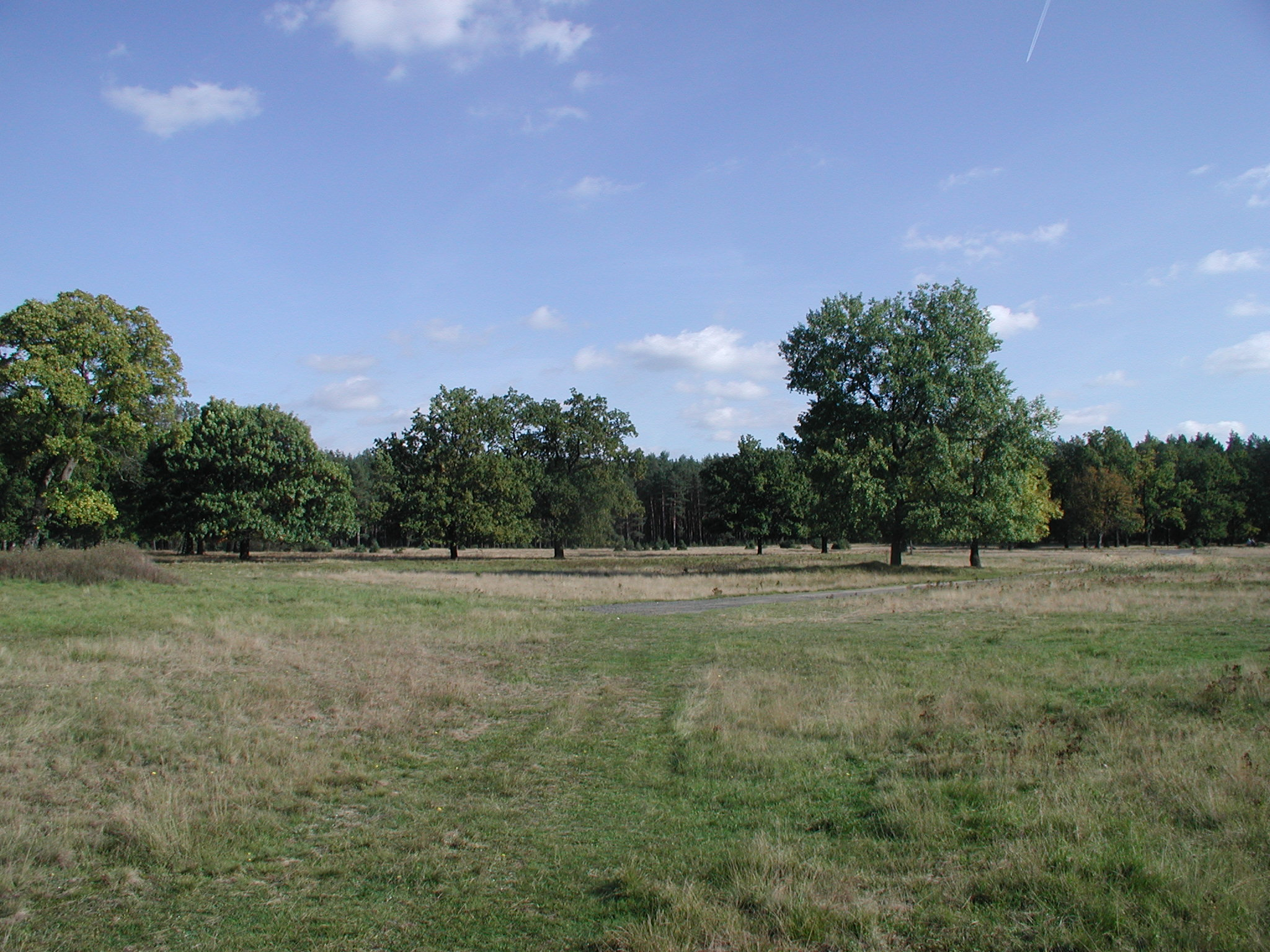 Abandoned village Strážov